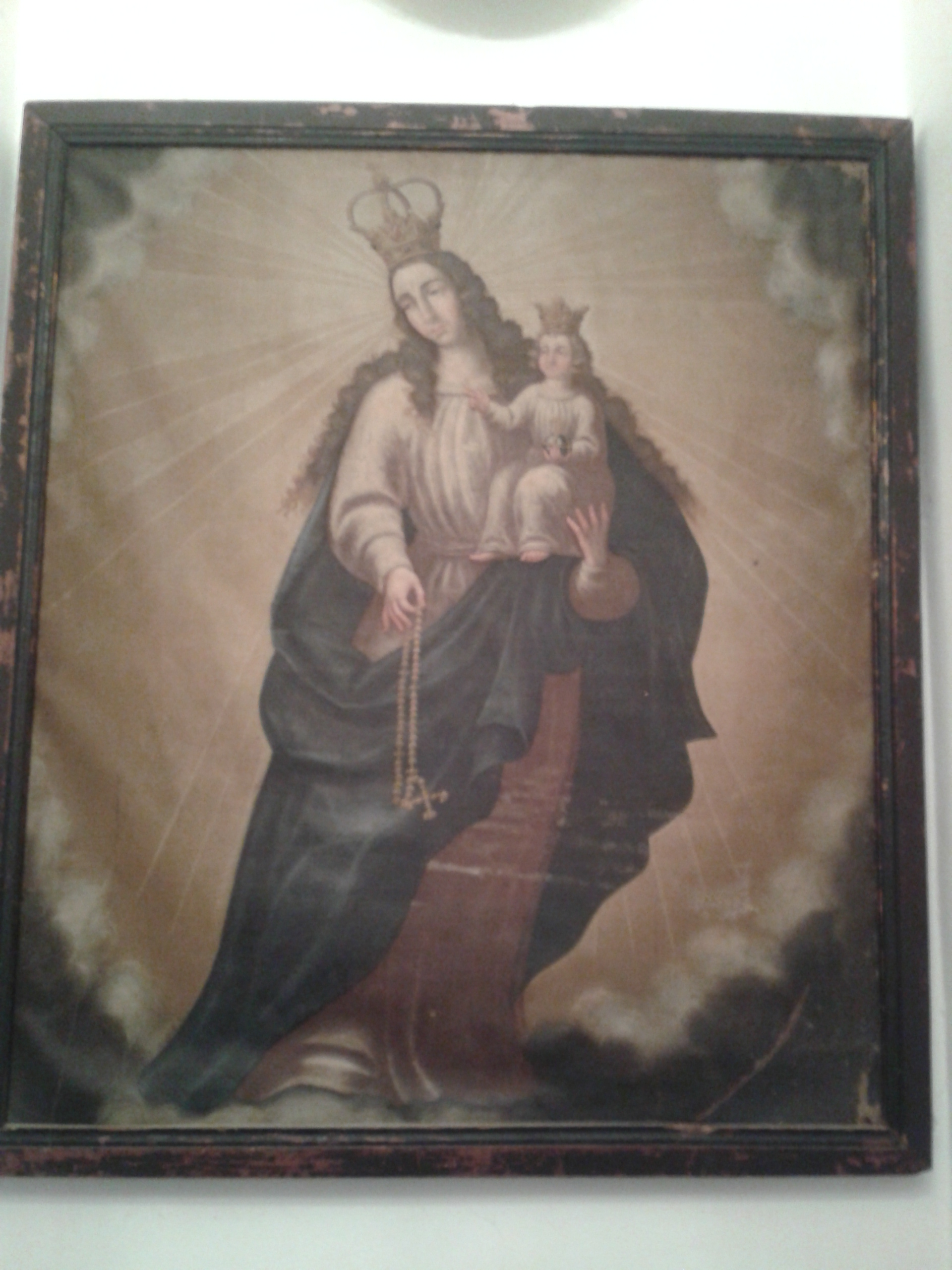 Óleo sobre lienzo que representa a la Virgen portando al Niño en su brazo izquierdo y un rosario en su mano derecha. La Virgen emerge sobre un fondo de rayos de luz que se abren paso a traves de una nube que se disipa para contemplar la escena celstial. La Virgen ataviada al modo de las Inmaculadas tradicionales, lleva el pelo en melena rizada y porta corona Real. El niño sedente sobre el regazo de la Virgen imparte su bendición como Rey del Universo. Pintura anónima de marcado interés devocional mariano bajo la advocación del Santo Rosario. S. XVII. Marco de madera sin dorar. Colección Particular. Tamaño: 103 X 90 cms